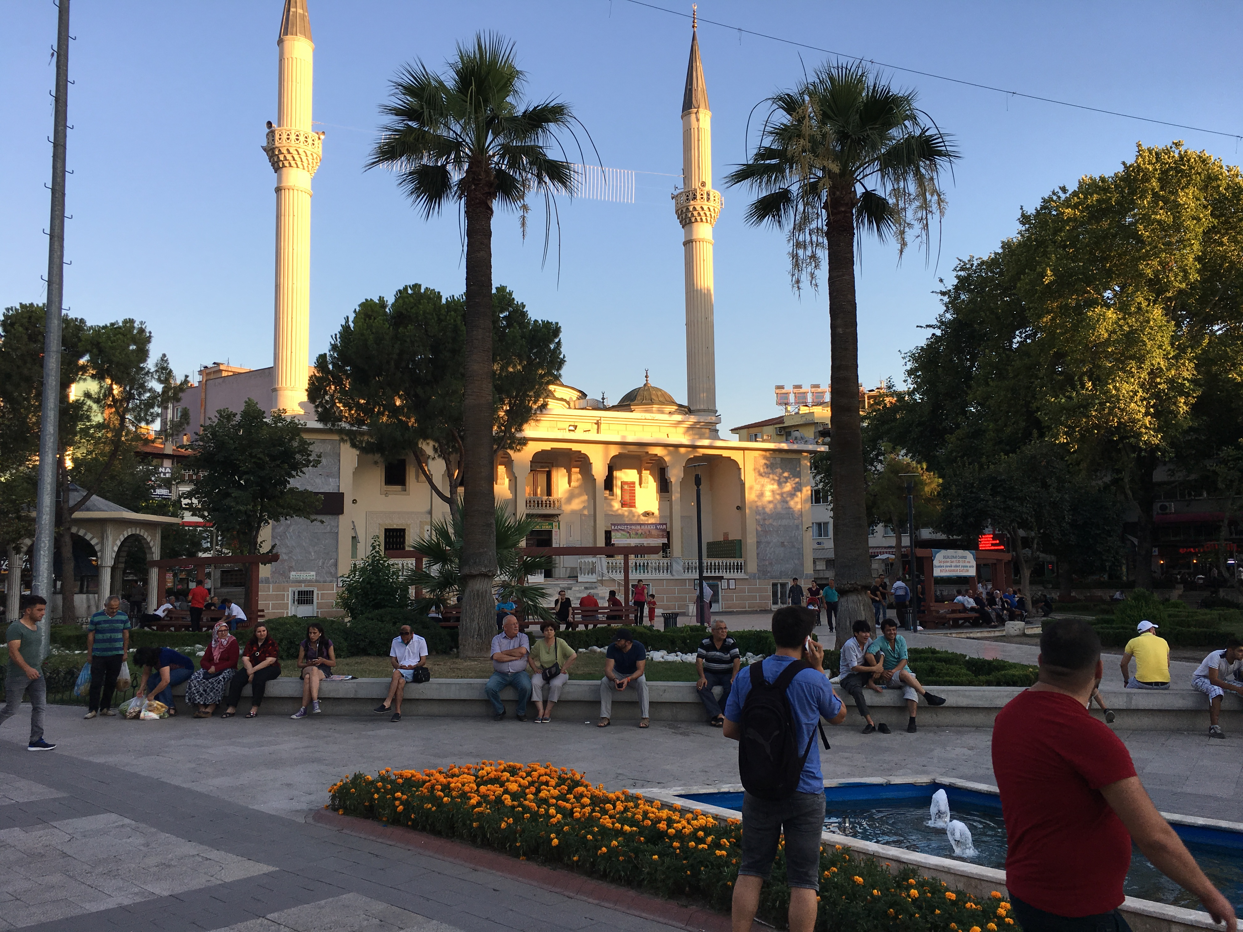 Mosquée Delikliçınar de Denizli